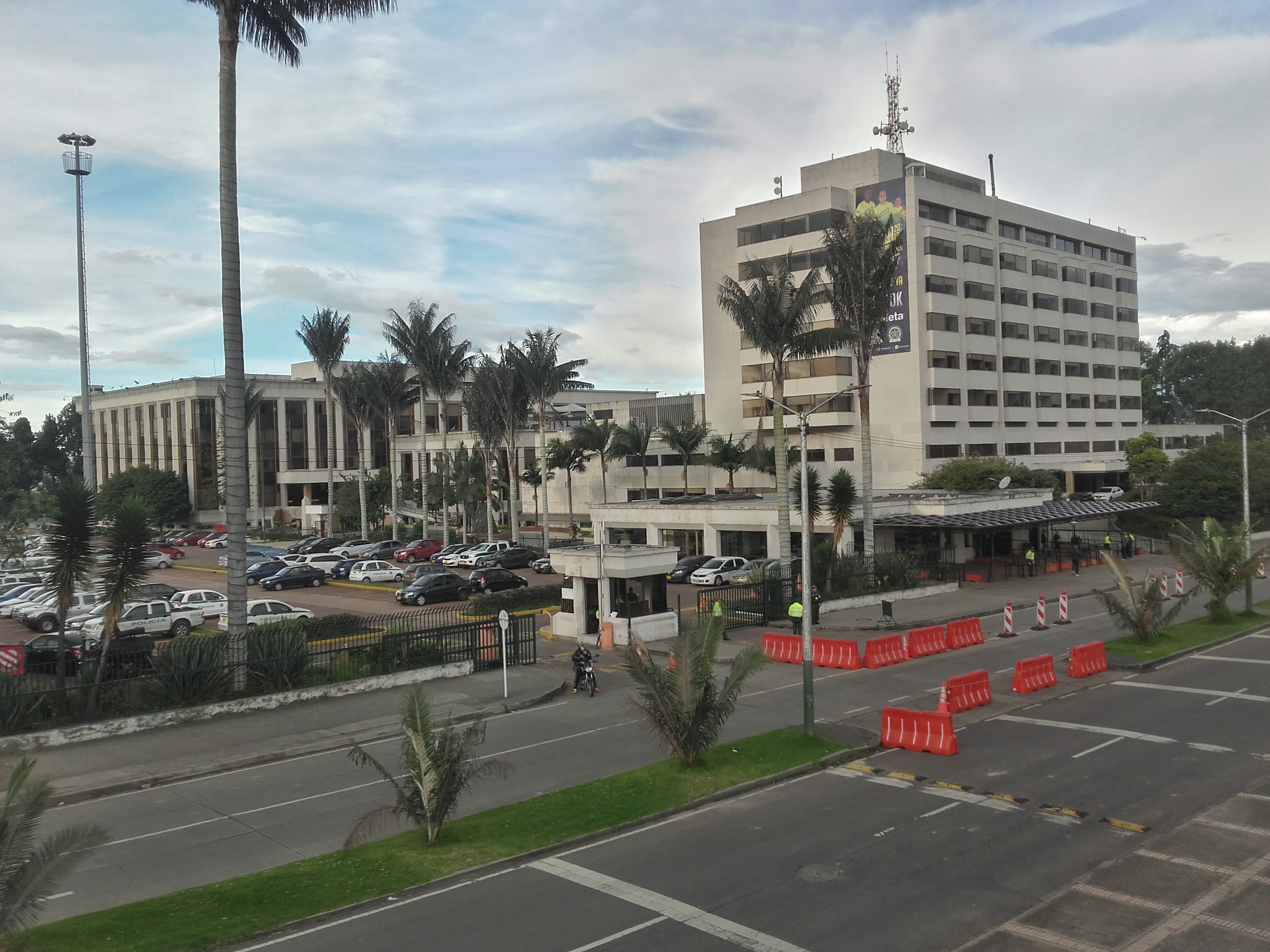 Dirección General Policía de Colombia, Bogotá nov 2019